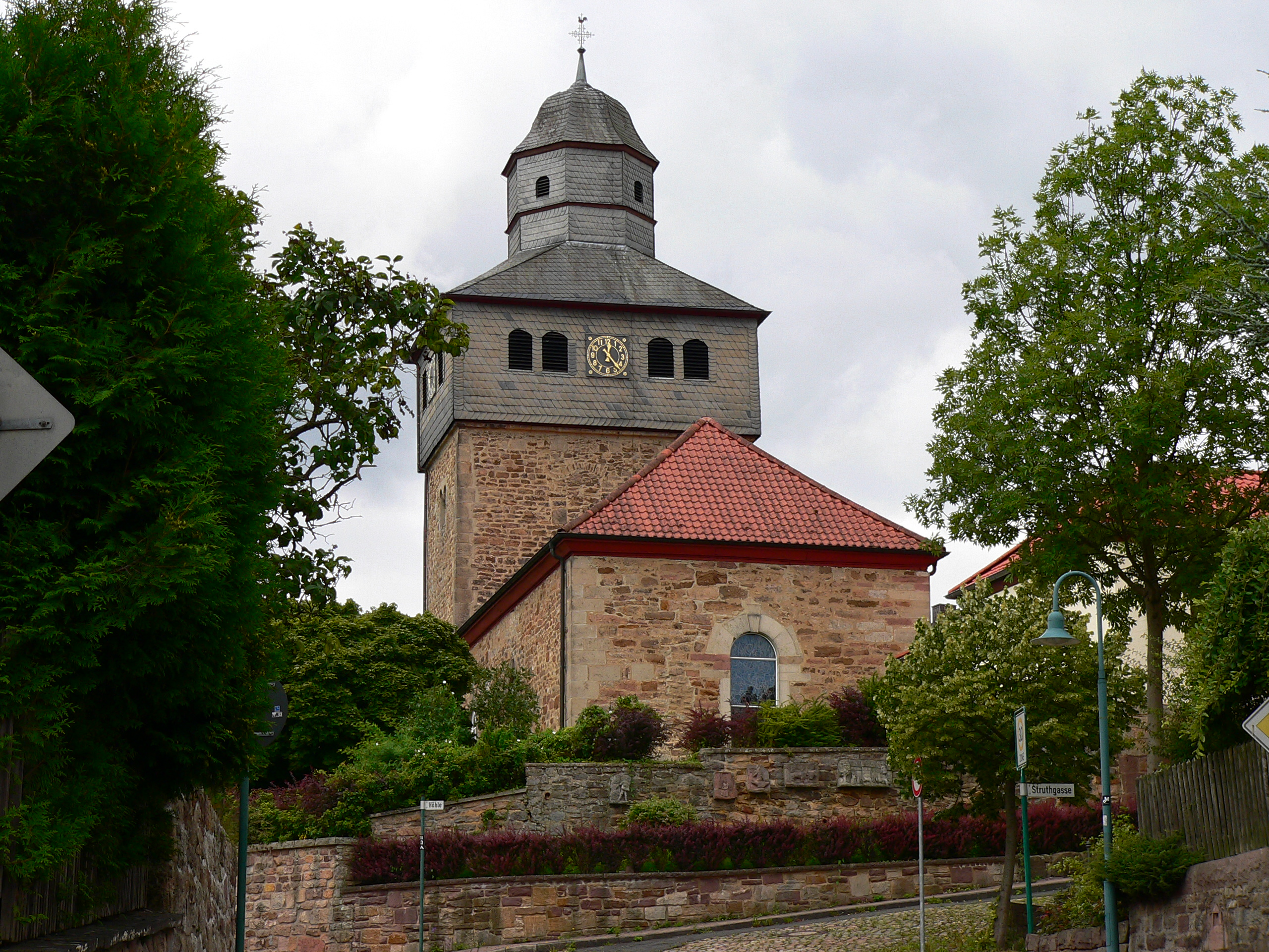 Kirche (ev.) in Helsa (Ortsteil Eschenstruth), Hessen, Deutschland.